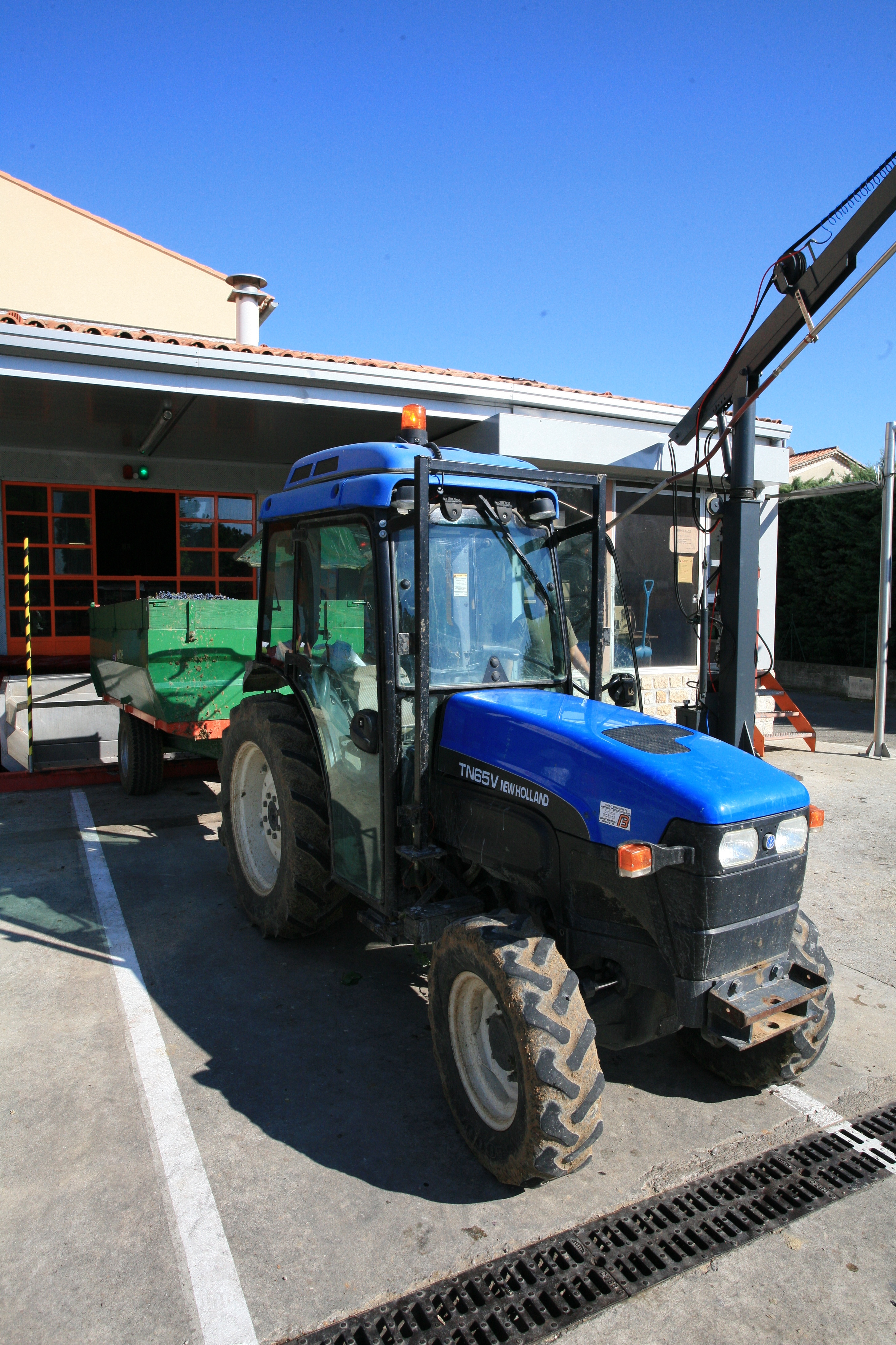 tracteur devant cave de Vacqueyras,France